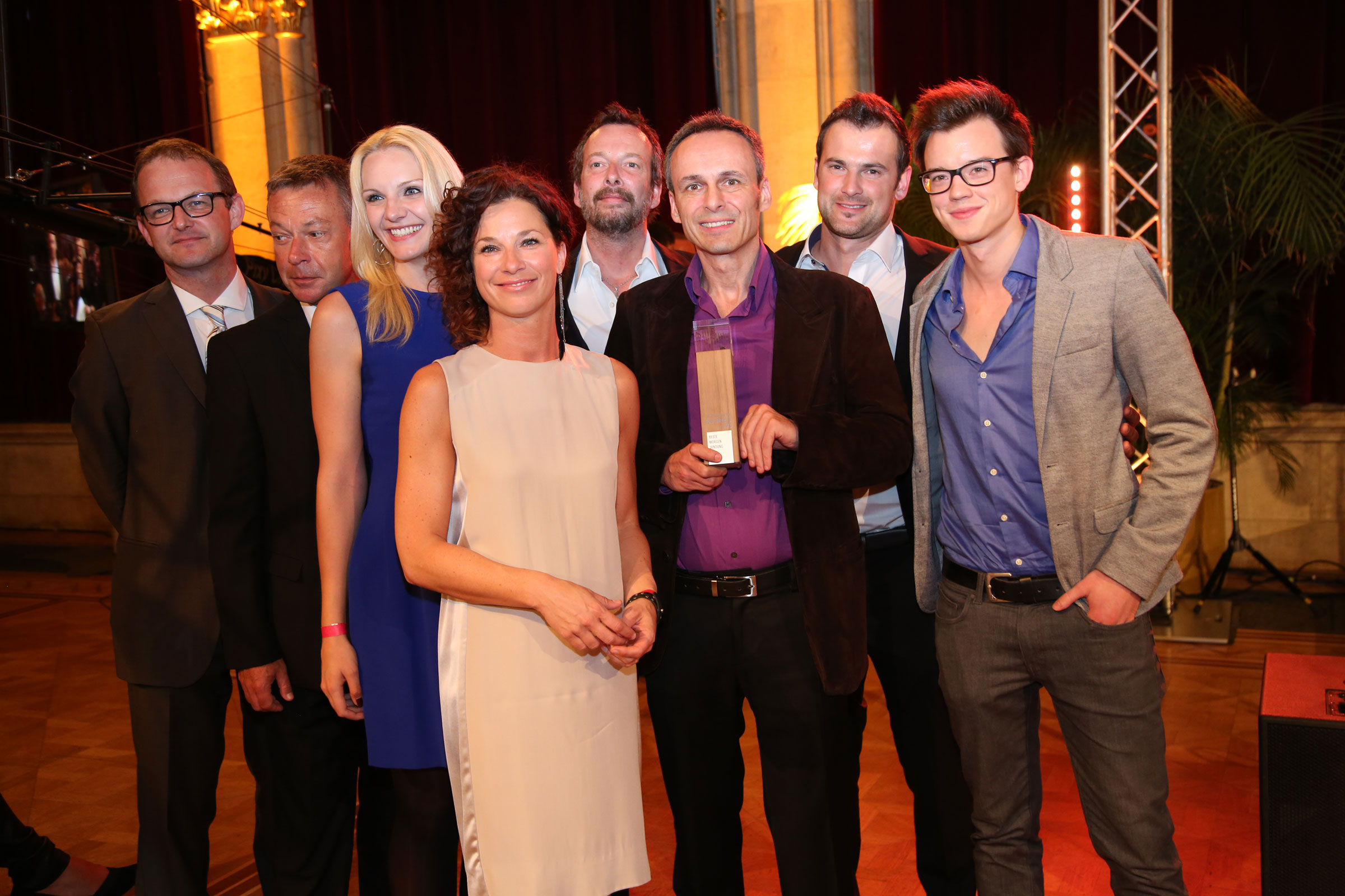 13-Beste-Morgensendung-Ö3-Wecker-5467